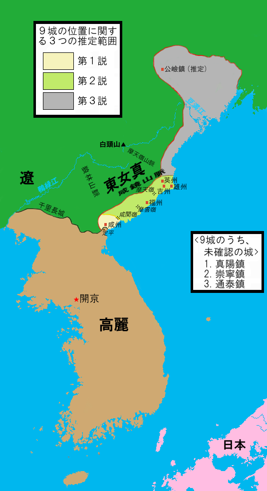 韓国教員大学校歴史教育科教授陣 執筆 『アトラス韓国史』 四季節出版社、2004年9月20日、ISBN 8958280328（邦訳：吉田光男 監訳 『韓国歴史地図』 平凡社、2006年、ISBN 9784582411058）の74頁に基づく東北9城の推定図。